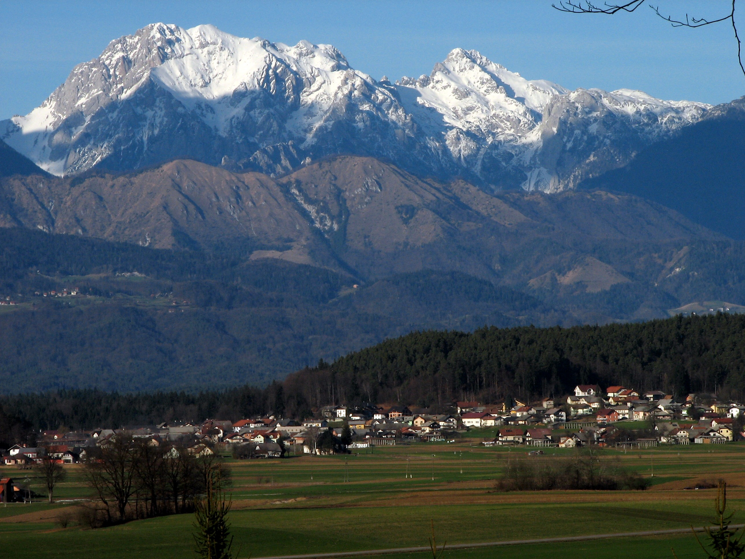 Bukovica pri Vodicah